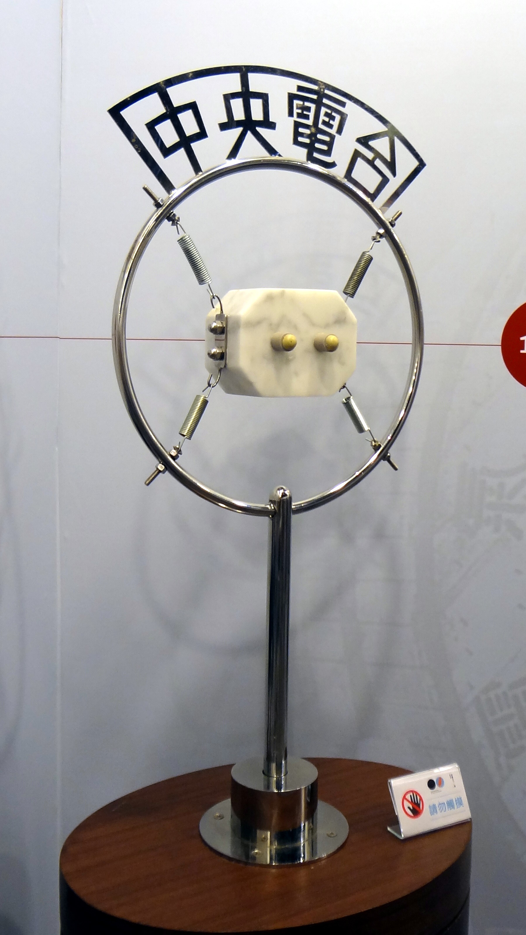 松山文化創意園區「金鐘五十．響 特別展」展示品：1945年的中央廣播電台碳粉式麥克風。此麥克風無解說牌，卻是中央廣播電台鎮台之寶（參閱中央廣播電台官方網站介紹）。